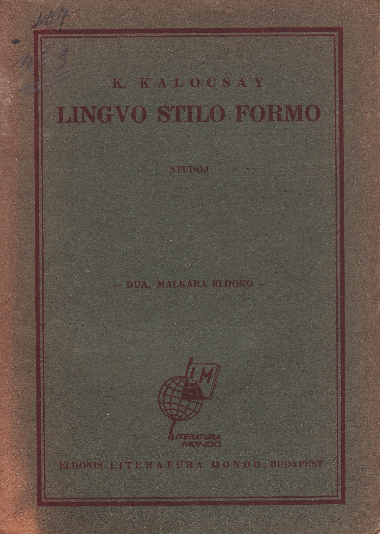 la kovrilpaĝo de "Lingvo Stilo Formo"